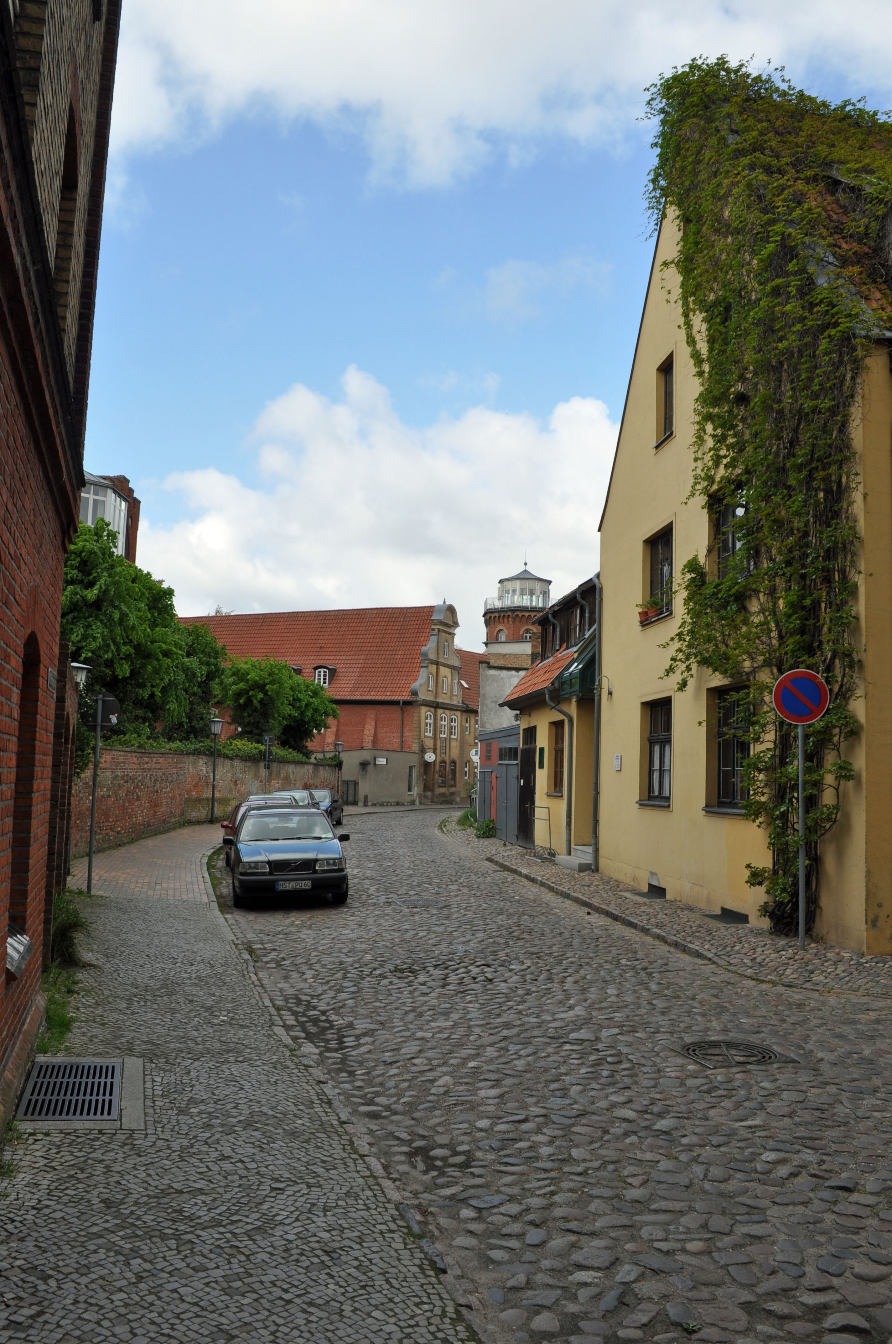 Gebäude in Stralsund, siehe Dateiname